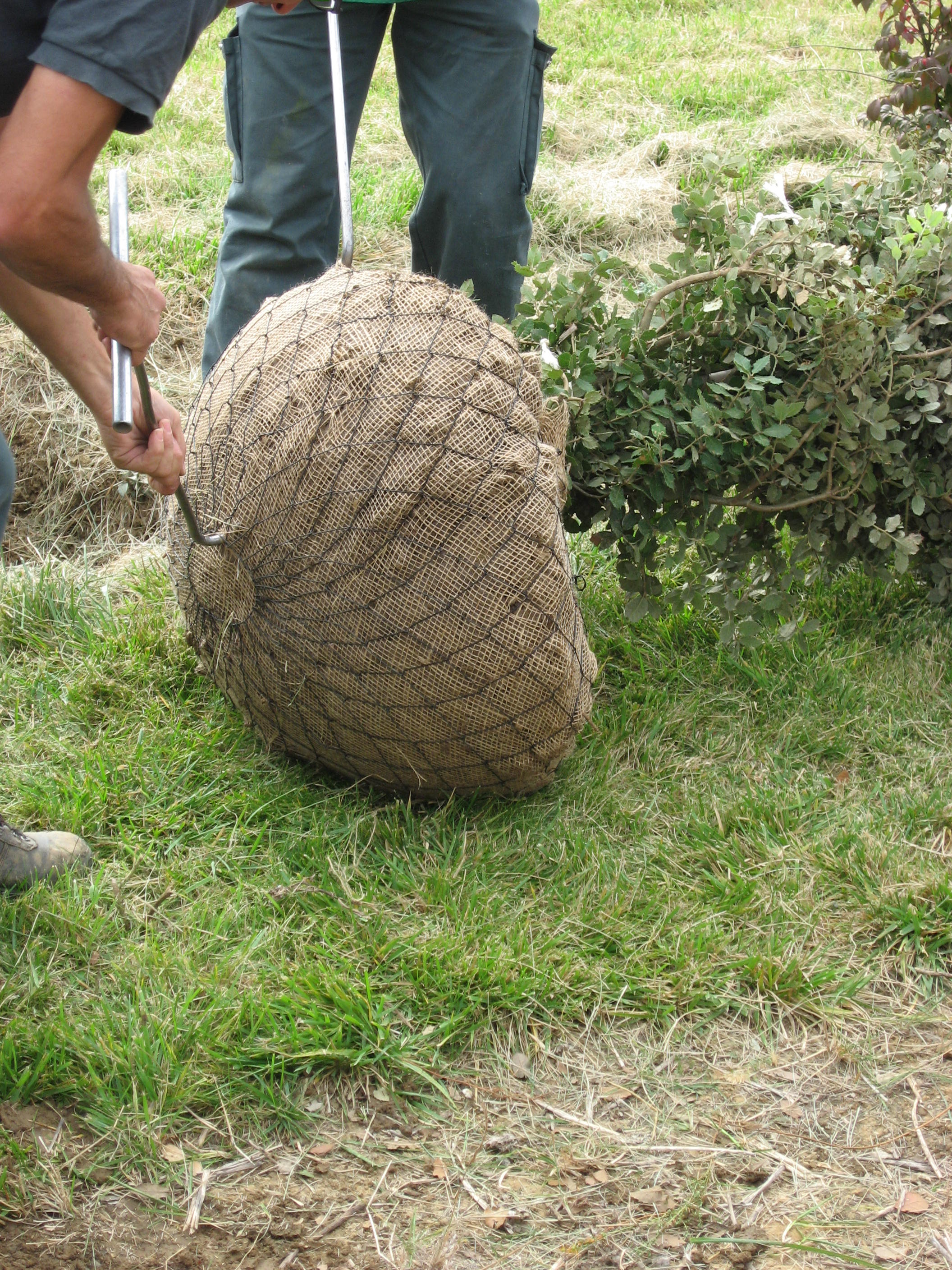 Démonstration de démottage d'arbre au Centre Horticole de la Ville de Paris un jour de porte ouverte